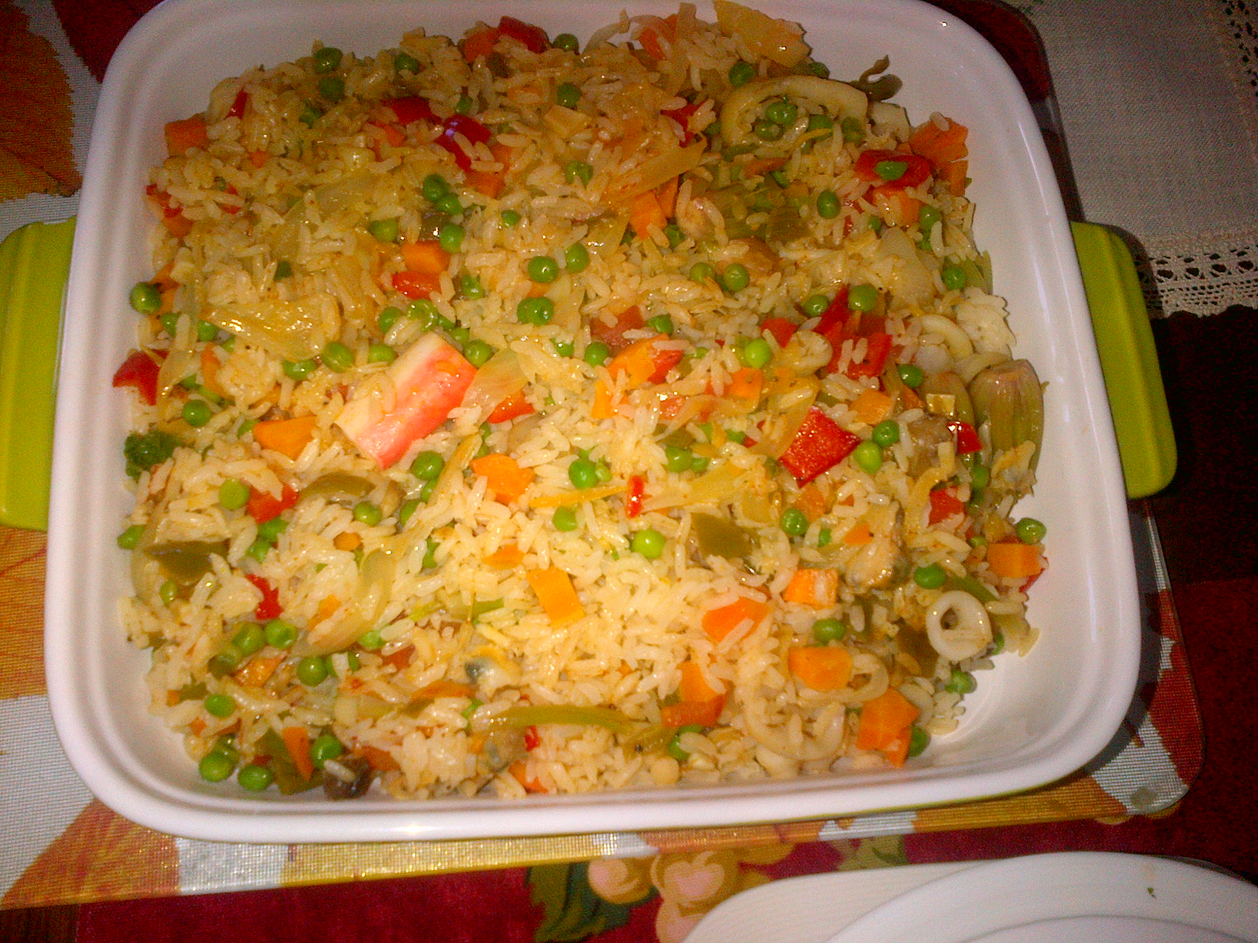 "Arroz a la valenciana" es un plato de la cocina chilena con verduras y mariscos, parecida a la paella, pero sin azafran. Si no se usan mariscos, se le llama "arroz a la jardinera".